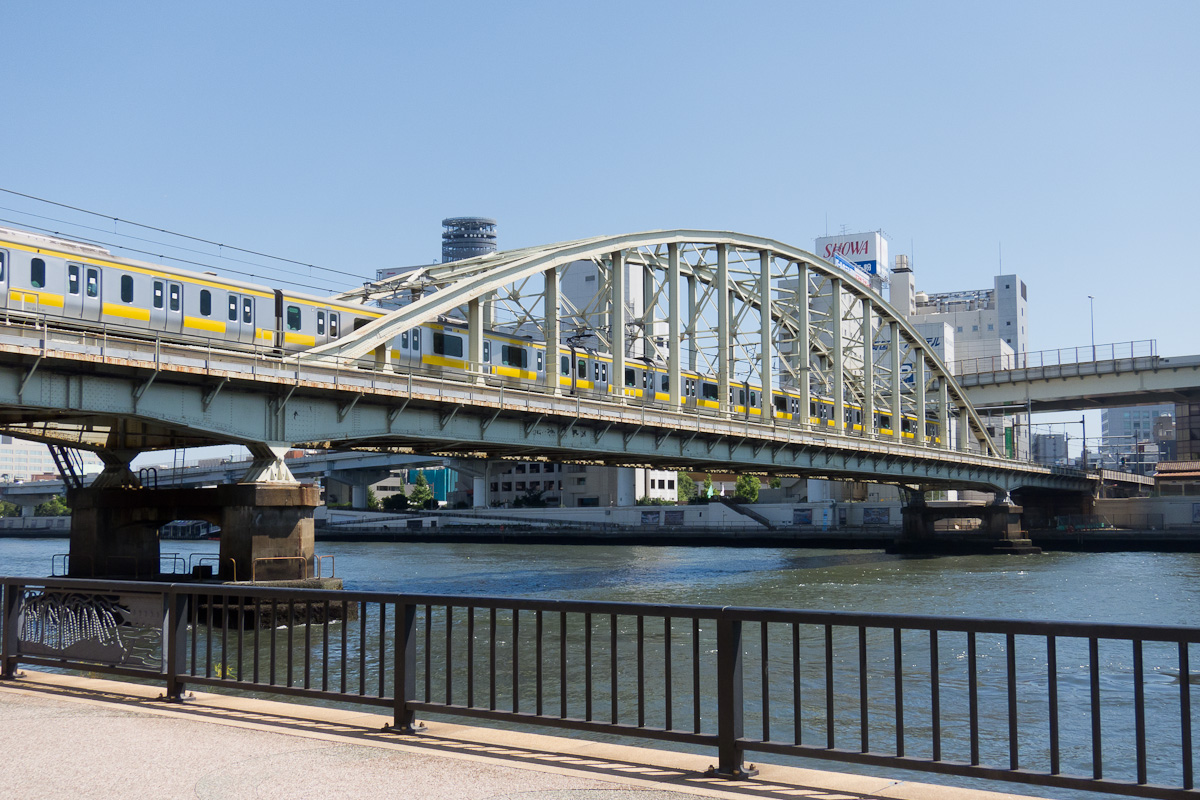 JR東日本総武本線隅田川橋梁、浅草橋寄りから。